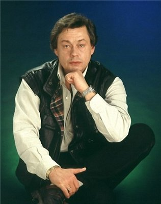 Николай Караченцов в сорок шесть лет